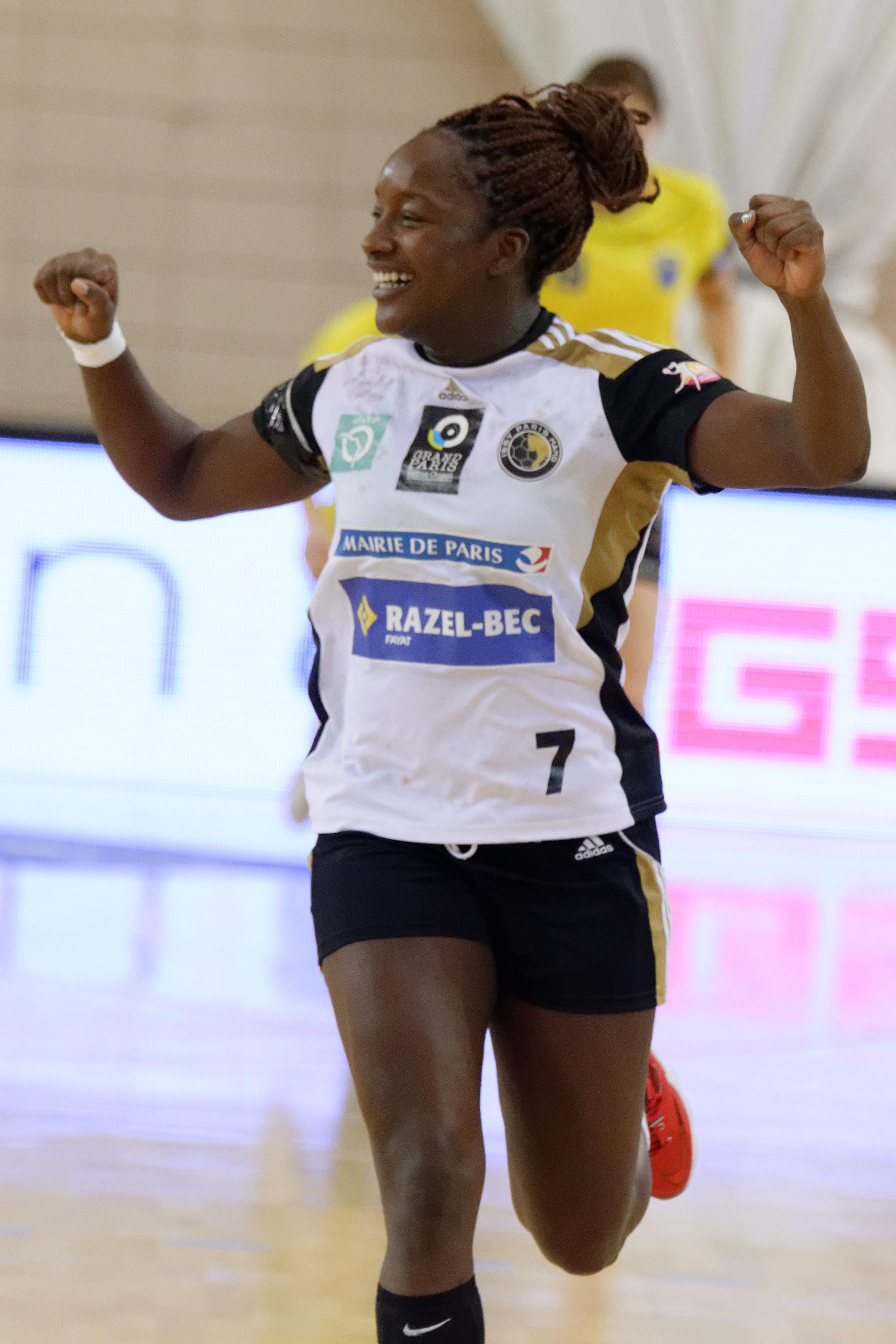 IPH-BSV-22NOV2015-044-Doungou_Camara